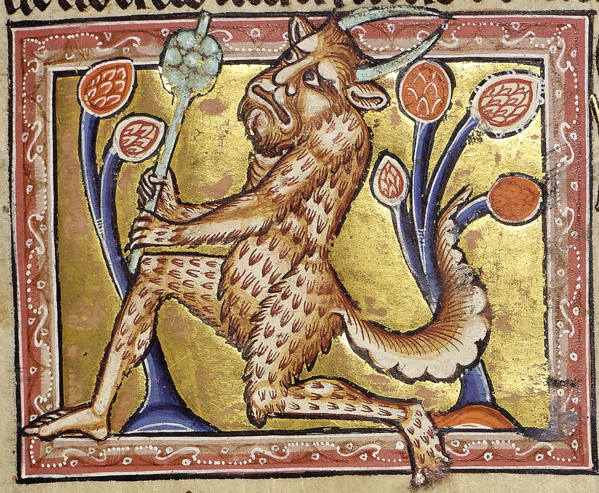 Sátiro, detalhe do Bestiário de Aberdeen, fl 13r (ampliado)